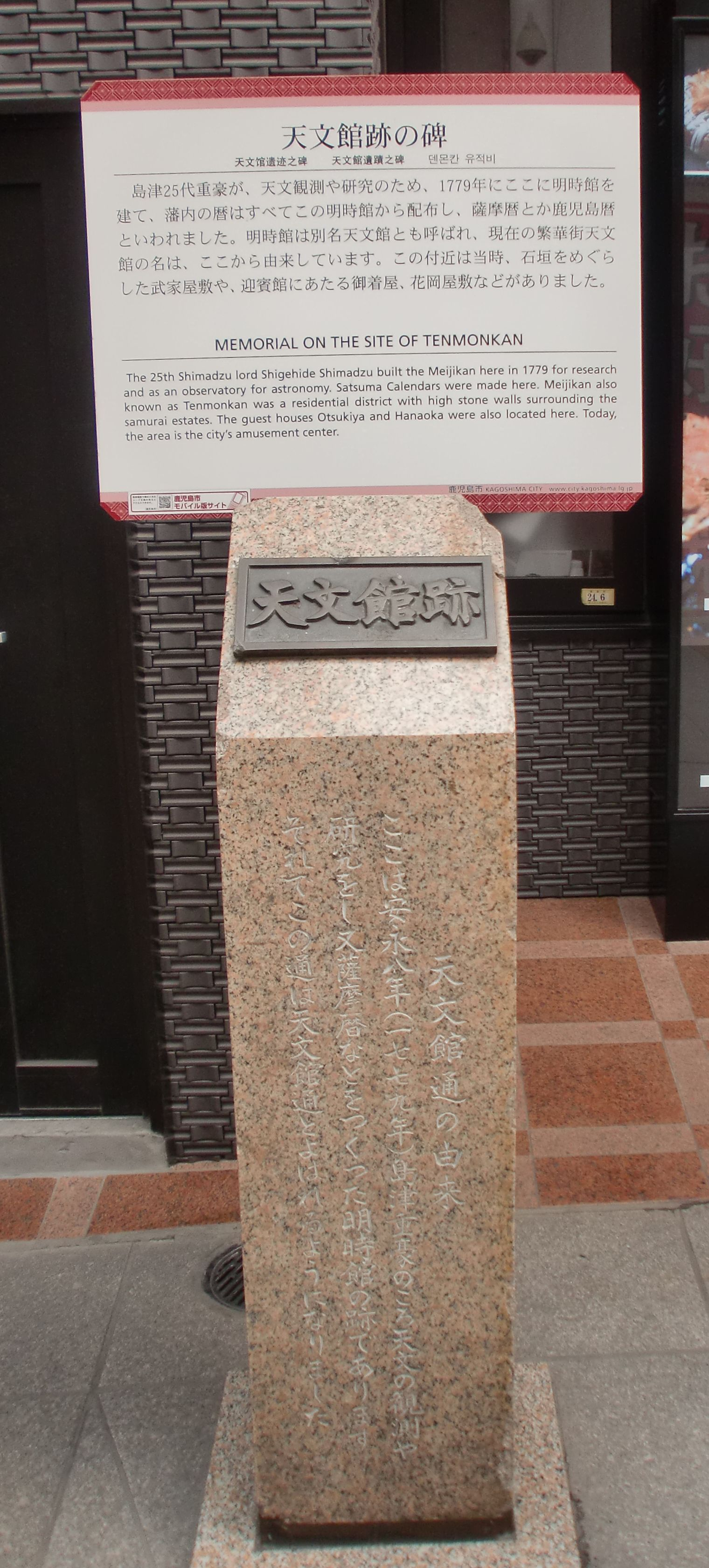 天文館（ここでの天文館は藩政時代の天体観測所）の跡の碑。商店街としての天文館の名称の由来となっている。